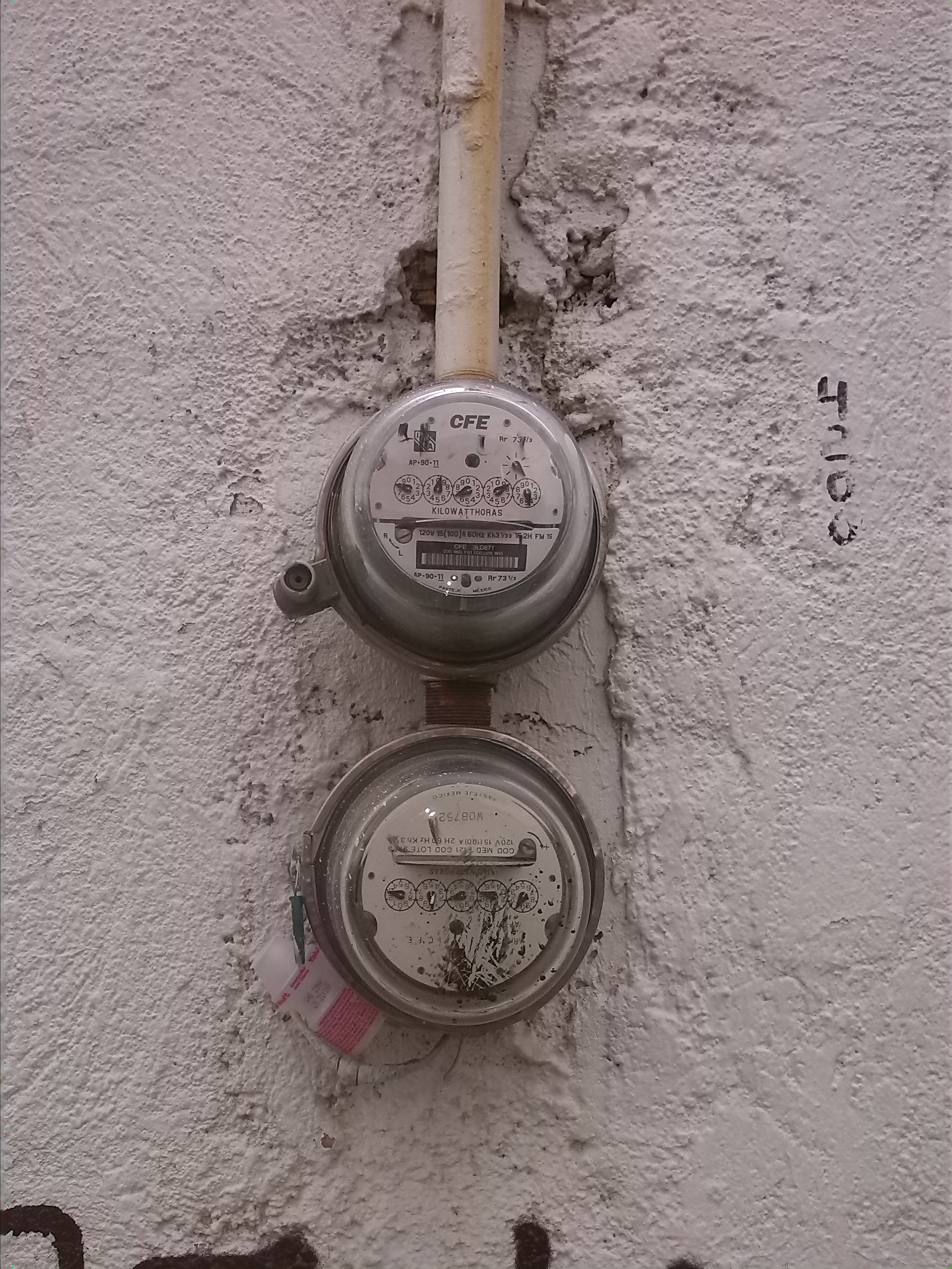 Medidor de luz mexicano